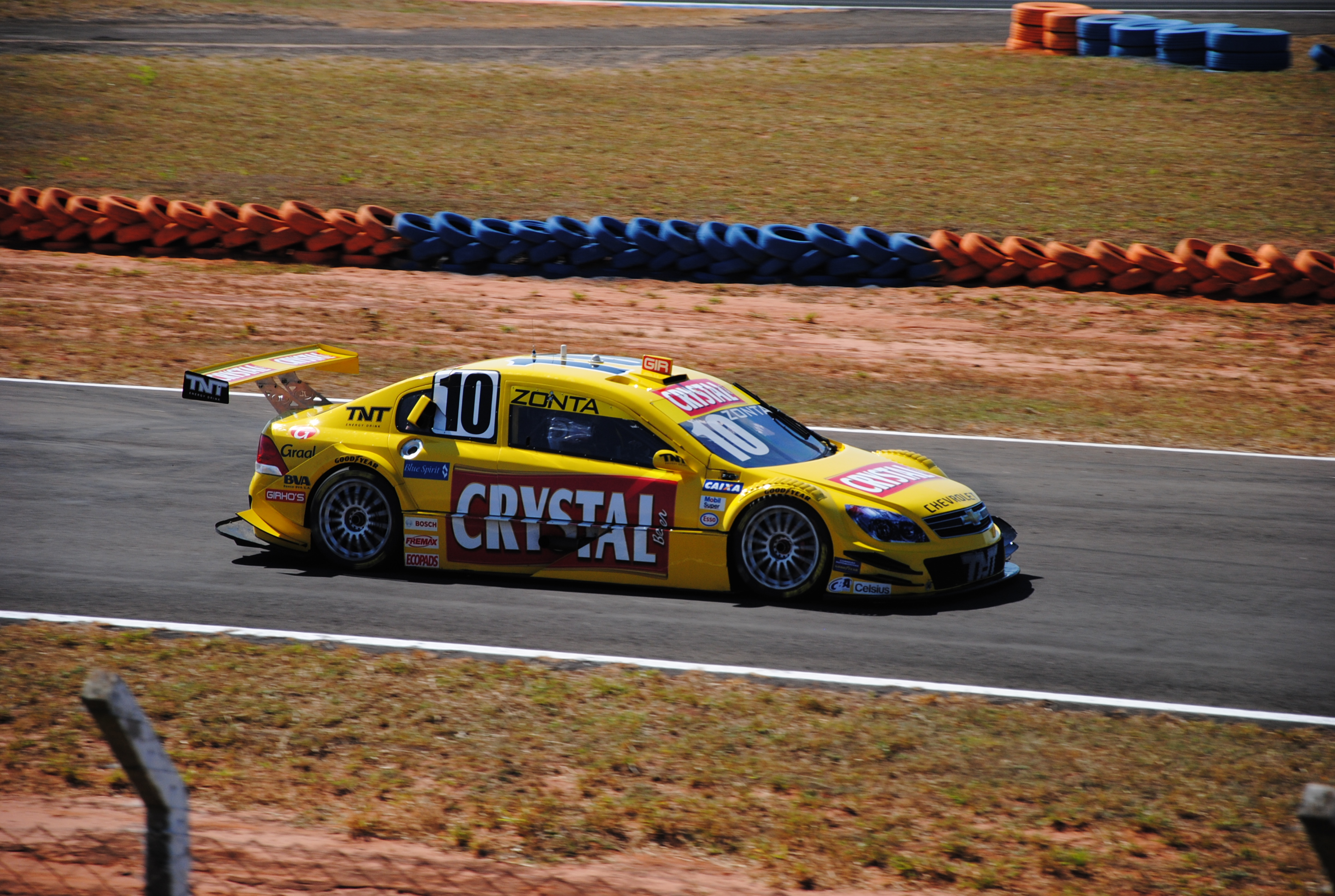 Stock Car Brasil series. Autódromo de Campo Grande, MS.